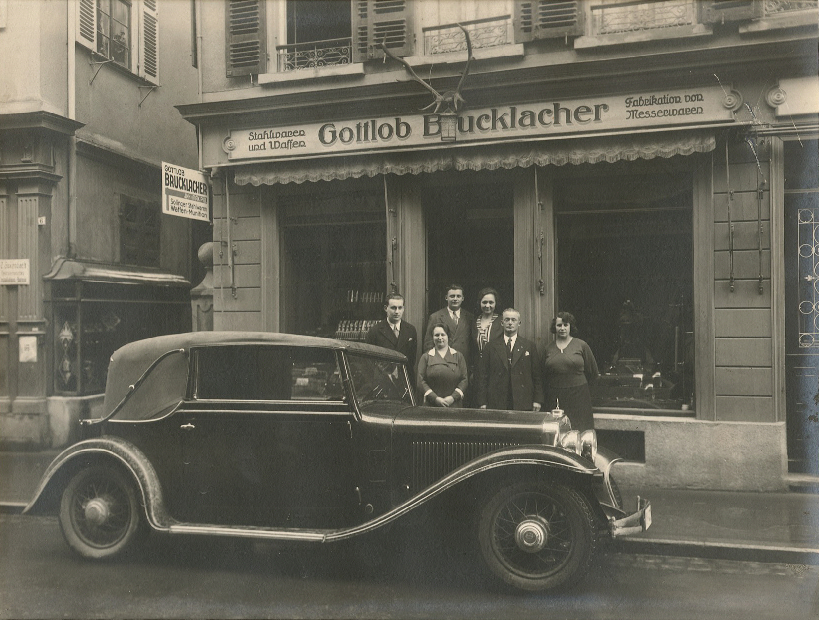 Otto Brucklacher, Stahlwaren und Waffen, Fabrikation von Messerwaren Das Ladengeschäft früher, Katharinenstraße 4, Reutlingen hintere Reihe von links nach rechts: H. Werner, Max Piel, Else Piel, geb. Richling vordere Reihe von links nach rechts: Frieda Lindemann geb. Riechling, Hubert Piel, Anna Piel, geb. Reuter Automobil: Adlerwerke